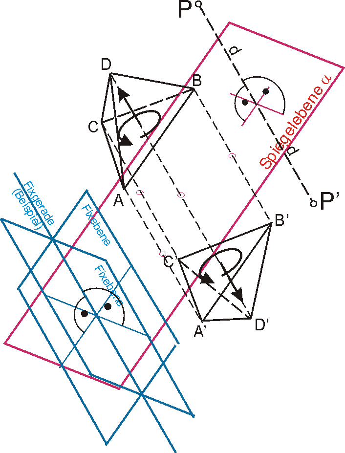 Veranschaulicht die Gesetzmäßigkeiten der Spiegelung an einer Ebene